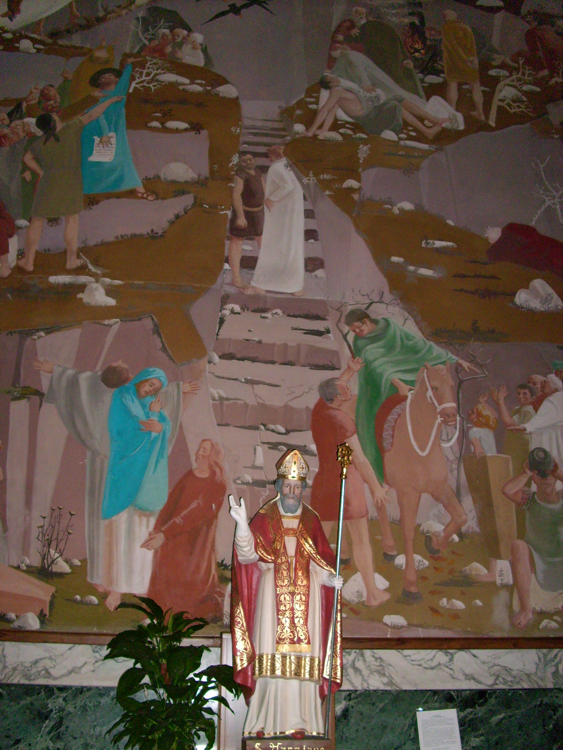 Interno della chiesa di San Marziano di Carasco, Liguria, Italia